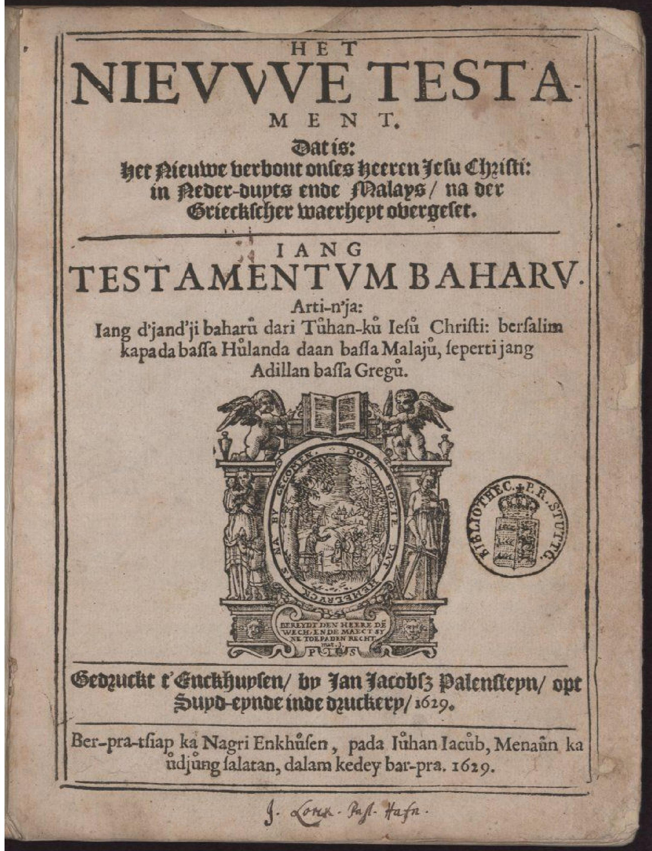 Het Nievwe Testament. Dat is: het Nieuwe verbont onses heeren Jesu Christi // Malay New Testament